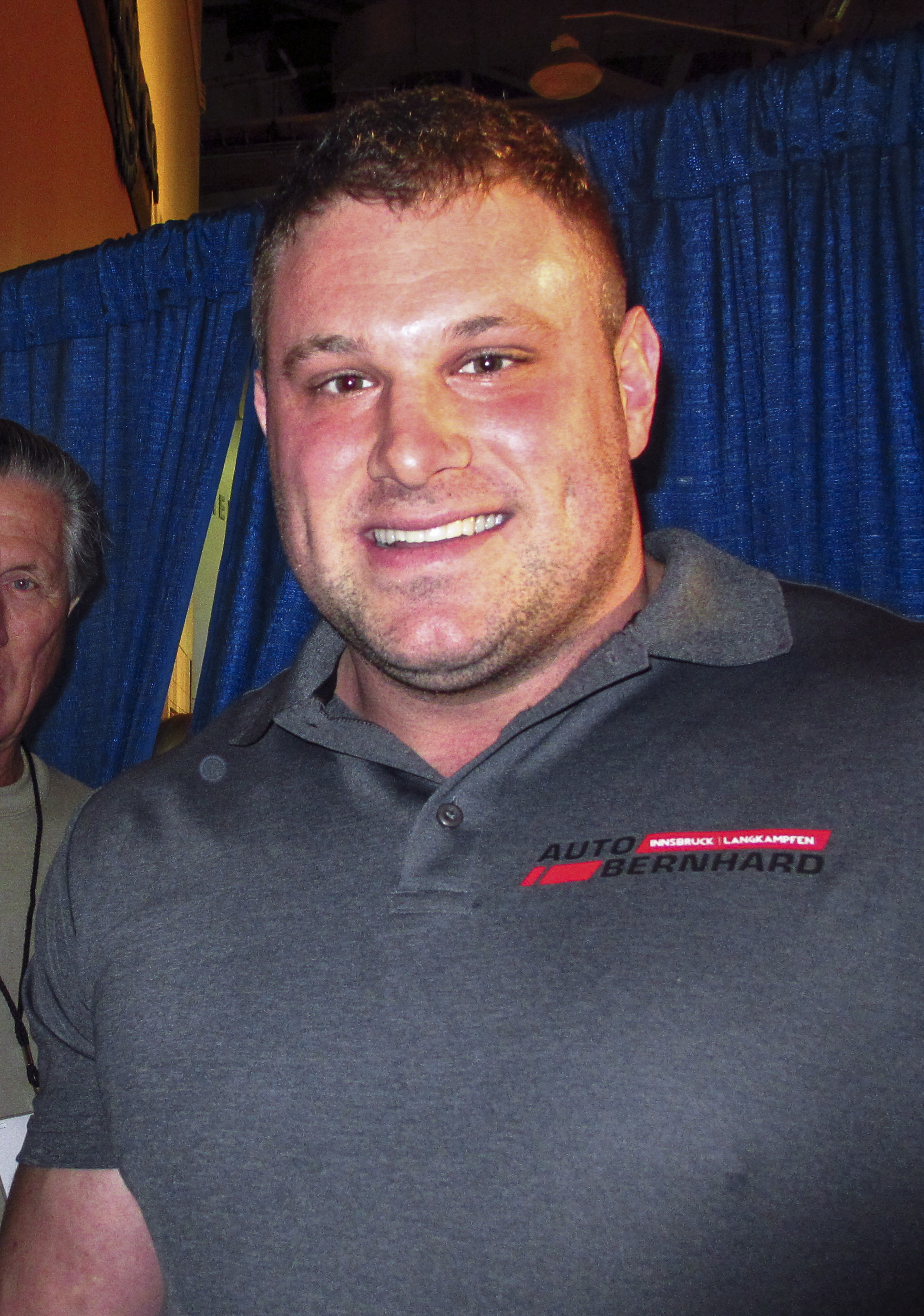 Strongman Champions League World Champion Martin Wildauer beim Arnold Sport Festival 2015 in Columbus, Ohio, USA.